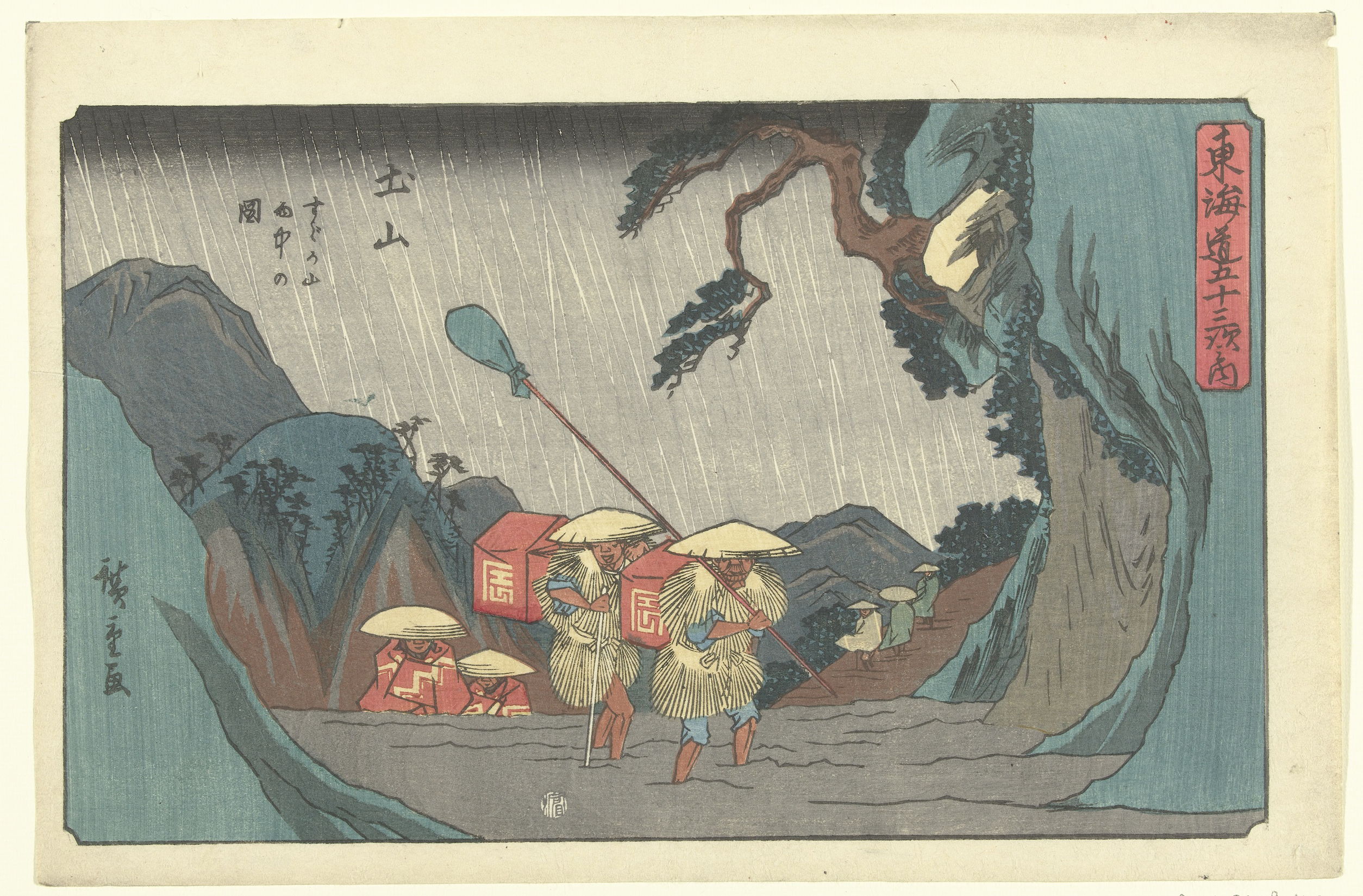 Reizigers, in de regen lopend over modderig pad, in berglandschap. Label Line: mentioned on object Hiroshige (I) , Utagawa (1797 - 1858), in of na 1843 - in of voor 1845, kleurenhoutsnede; lijnblok in zwart met kleurblokken Collection: prenten; Japan (collectie)